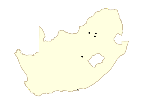 2009FIFACC